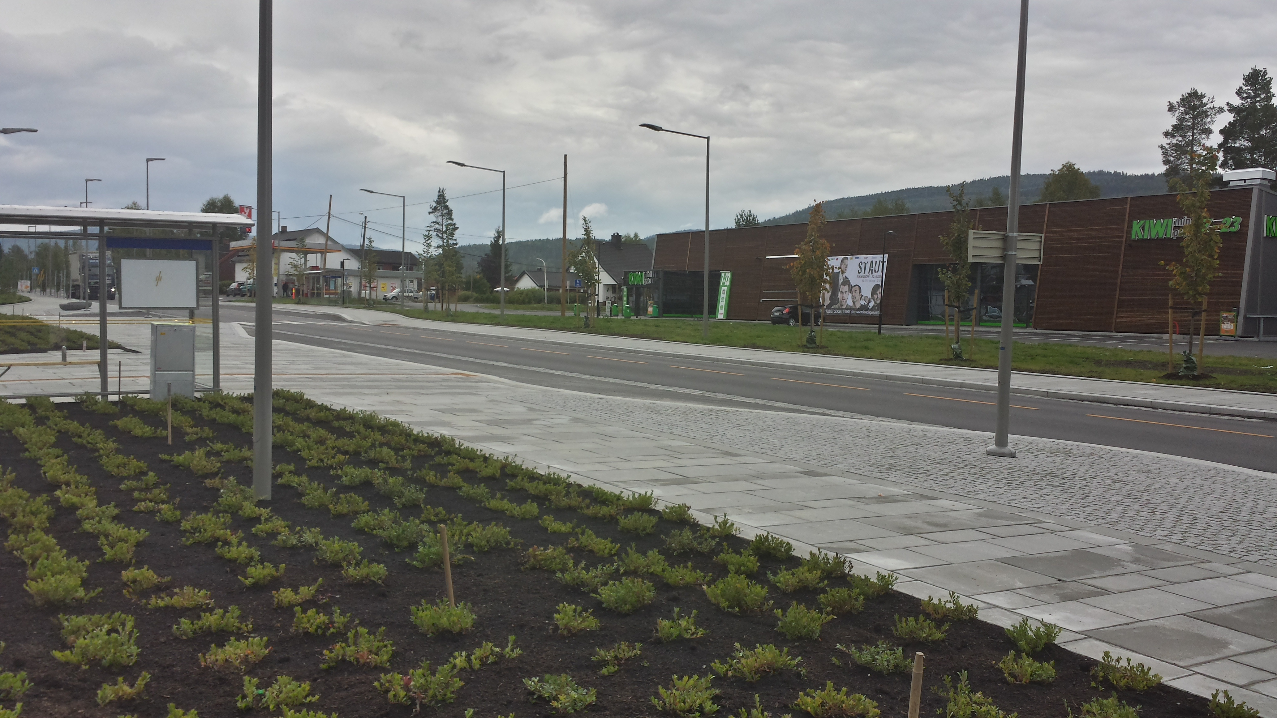 Sokna sentrum og den nye miljøgata (Riksveg 7)